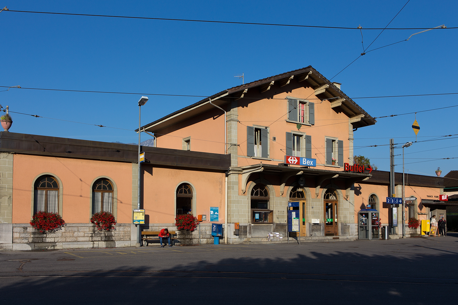 Bahnhof SBB in Bex (VD)